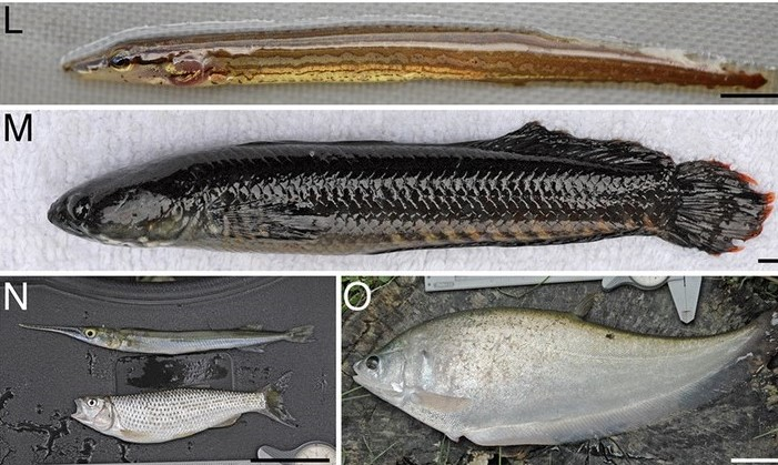 Para pemangsa ikan zebra